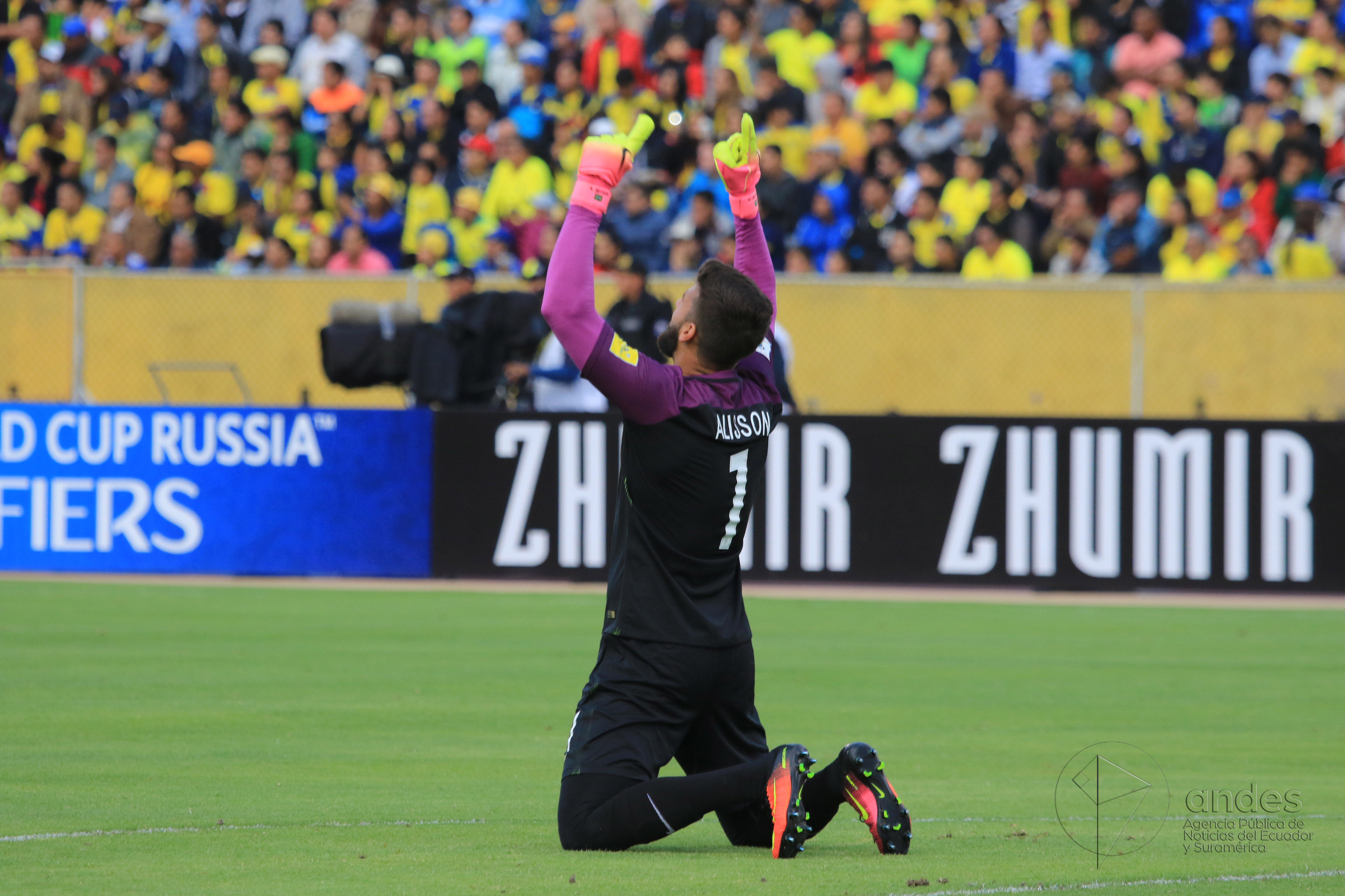 Quito 01 Sep (Andes).- Imágenes del encuentro entre Ecuador y Brasil por las eliminatorias al mundial Russia 2018. El resultado del encuentro terminó en 3 a 0 a favor del equipo garoto. Fotografías: Carlos Rodríguez/Andes.